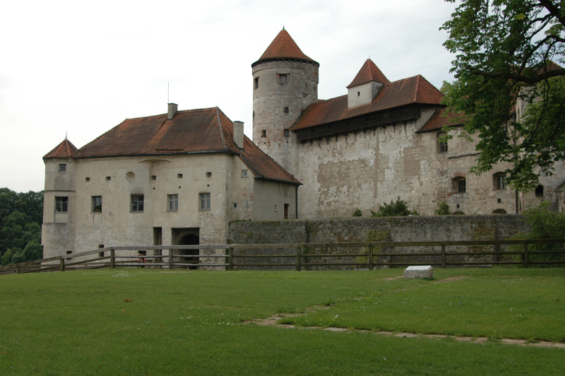 Burghausen Castle Hauptburg